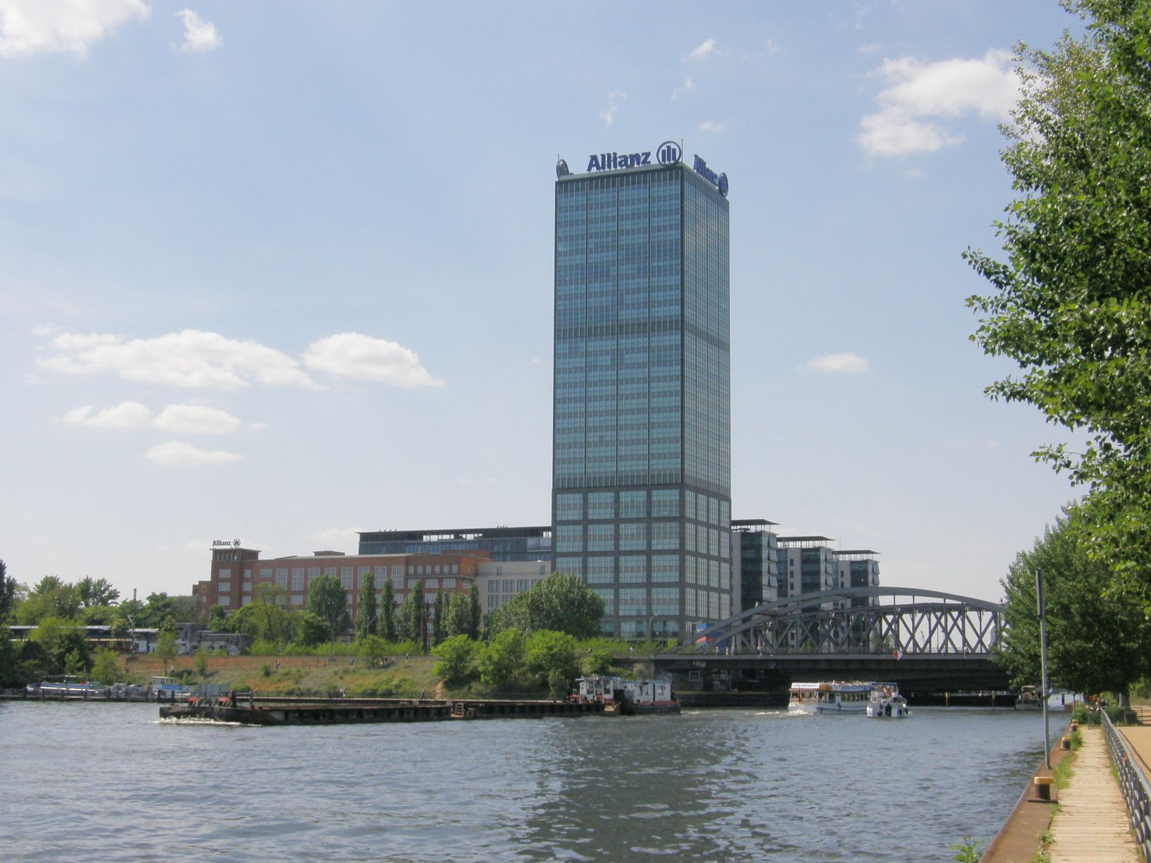 Blick über die Spree zu den Treptowers und der Elsenbrücke